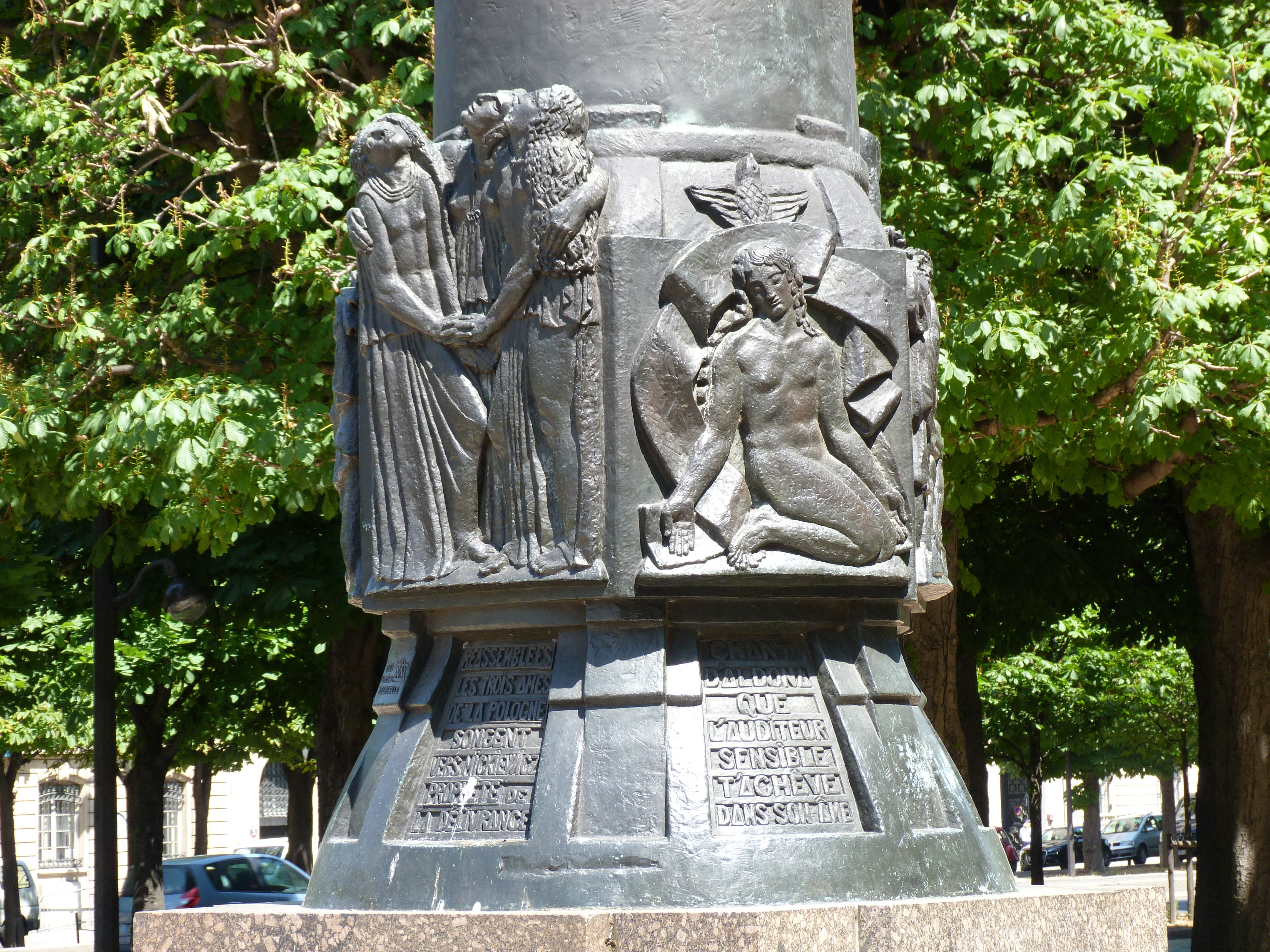 Monument à Mickiewicz par Antoine Bourdelle (1929), Cours Albert-Ier (Jardin d'Erevan, Paris 8e arrond.). Bas-relief sur le socle, vue 3